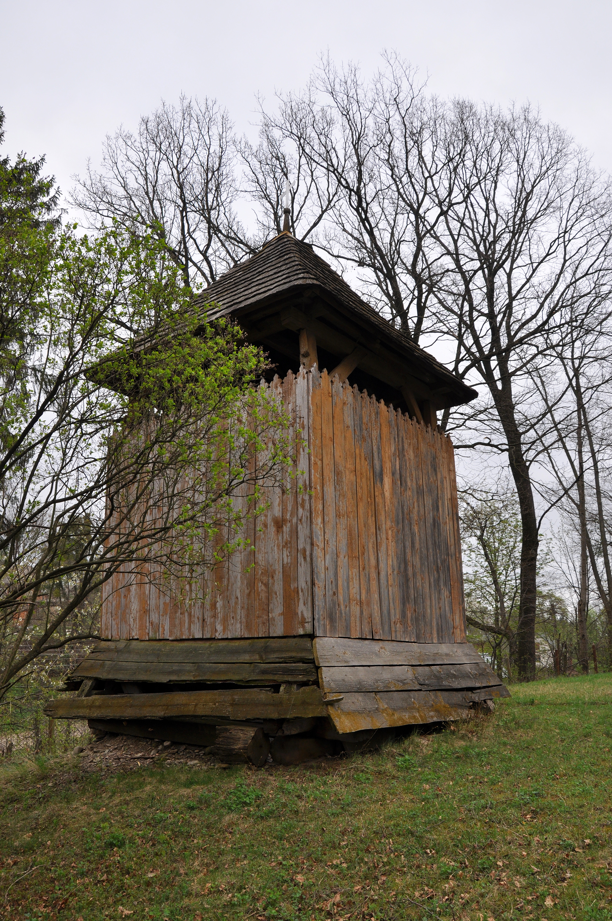 Дзвіниця церкви Св. Миколи (дер.), с. Підгірці